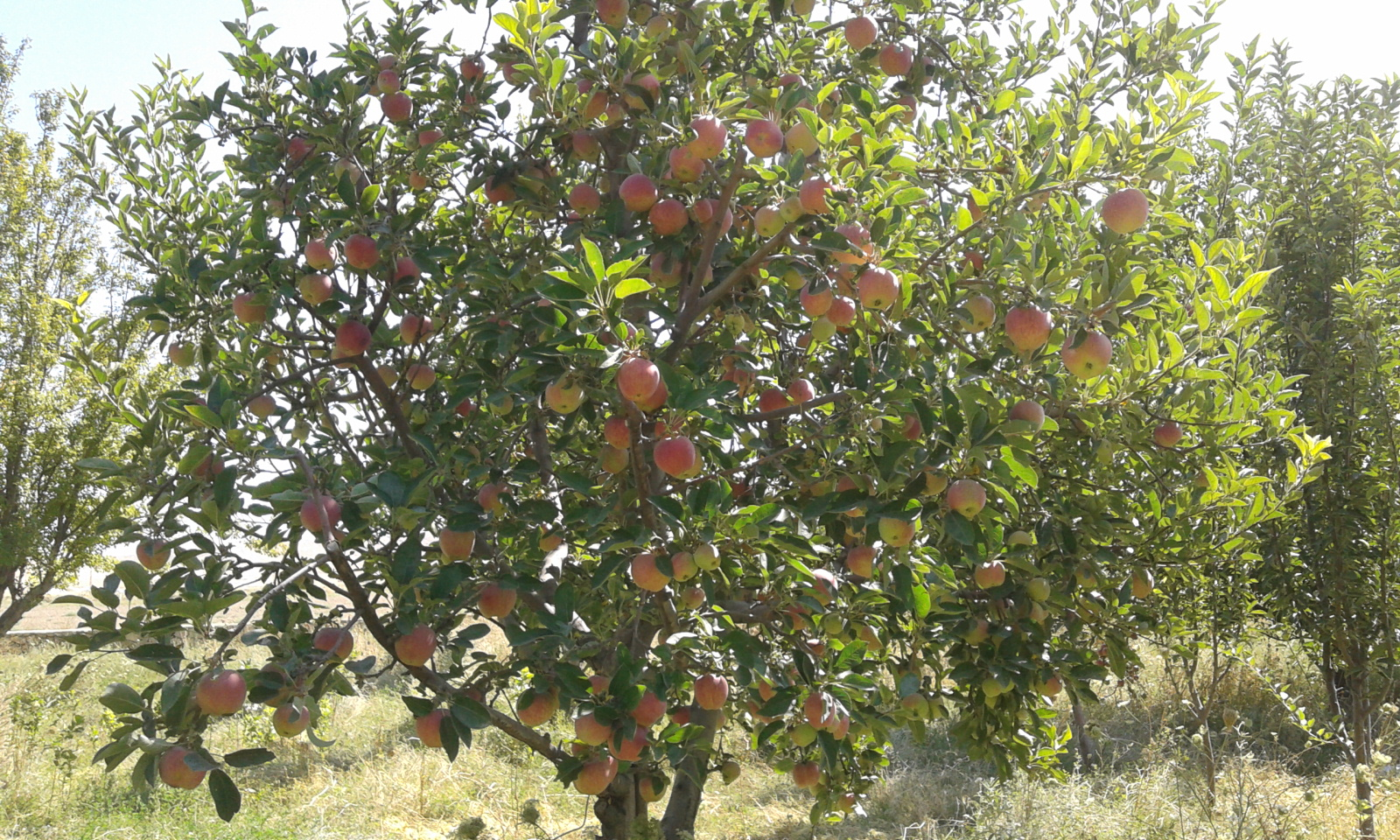 Eylül aylarında Karaman yöresinden bir elma ağacı.